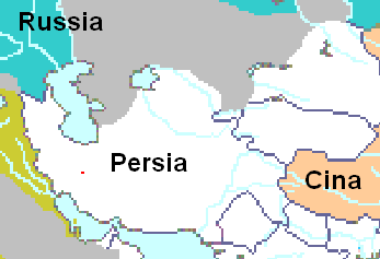 la persia sotto nadir scià